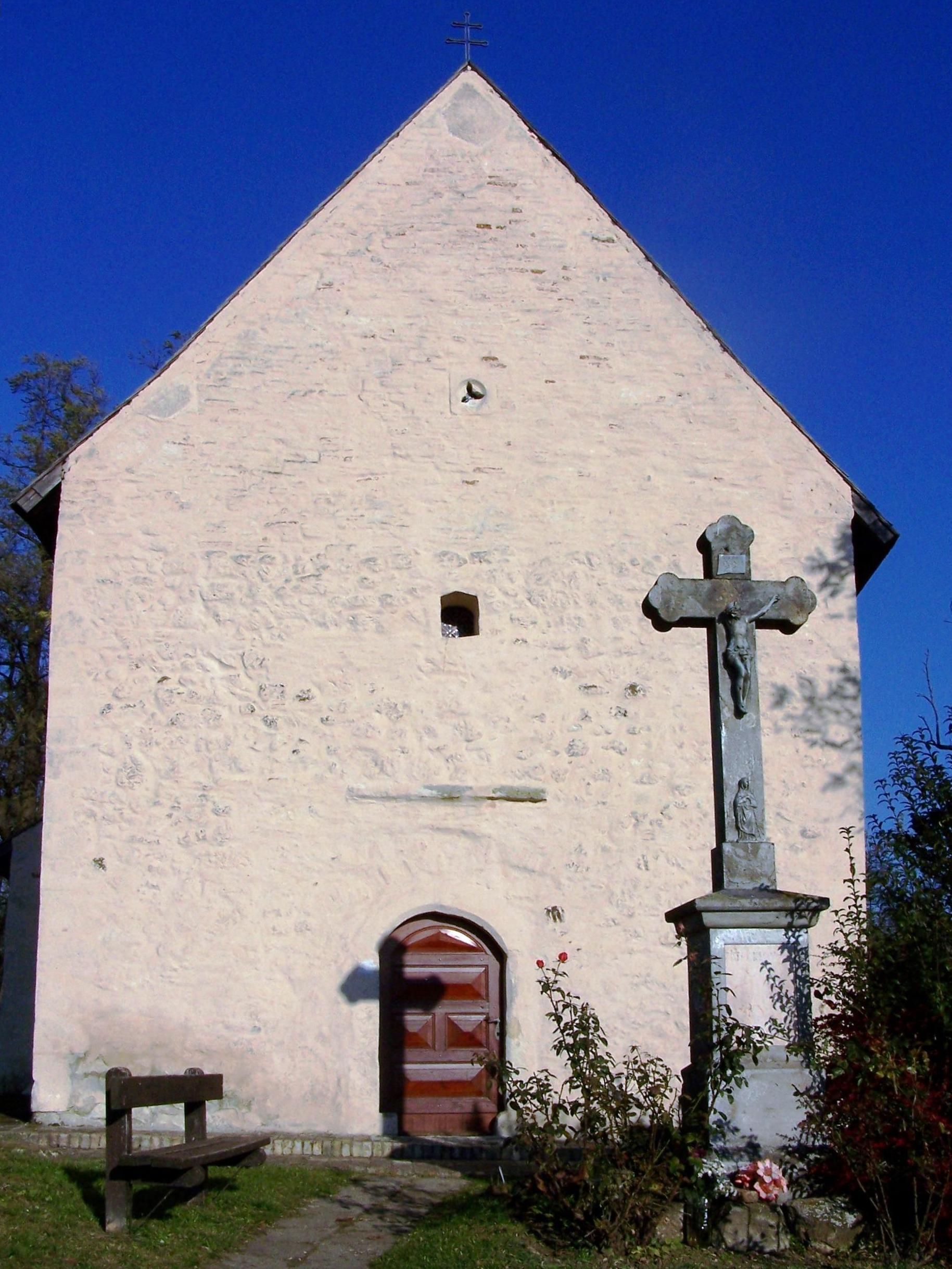 Római katolikus templom (Szent Imre) (Egyházasdengeleg, Temető) This is a photo of a monument in Hungary. Identifier: 6578